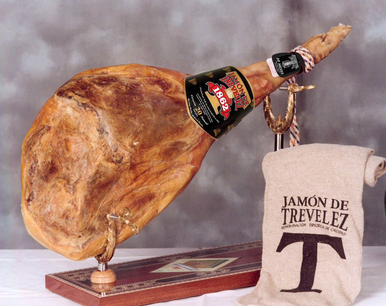 Fotografia de un jamón de Trevélez